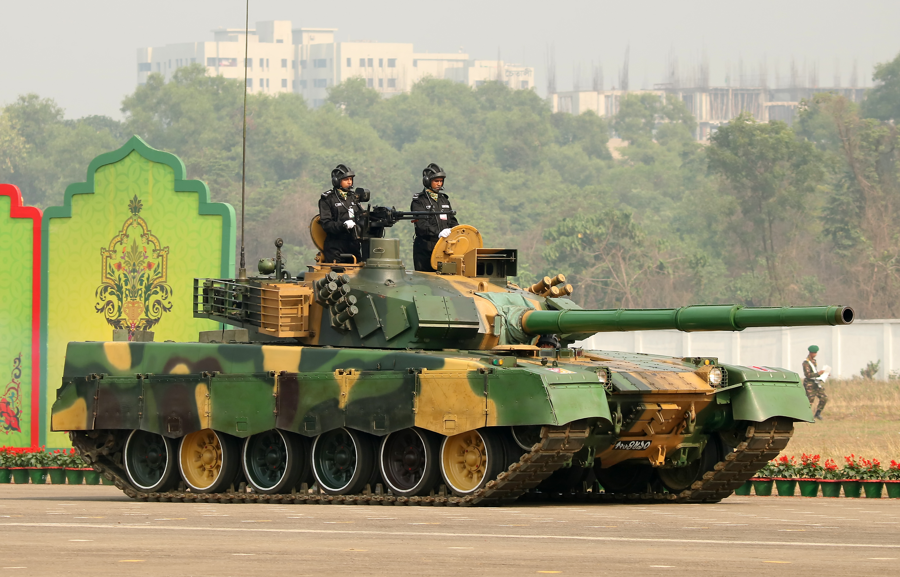 VGTJ/ VDFP 2017.